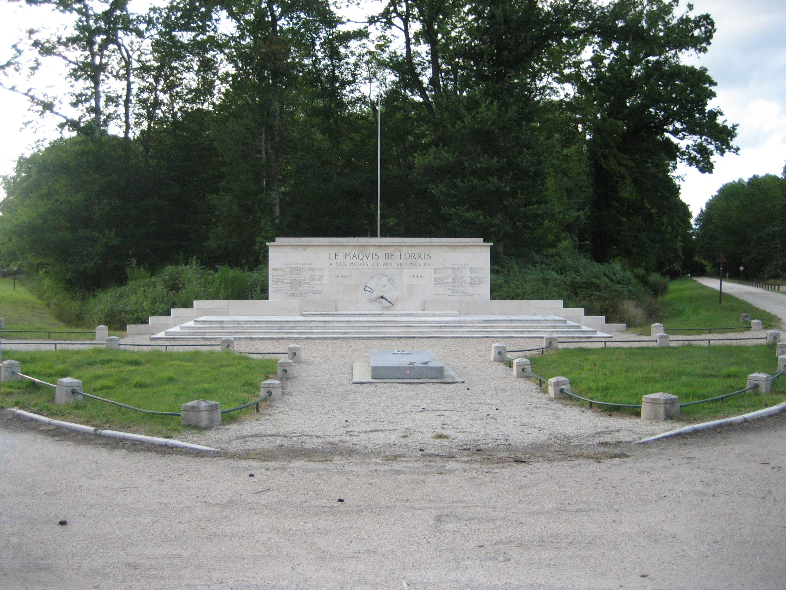 Carrefour de la Résistance, forêt d'Orléans, Loiret, France